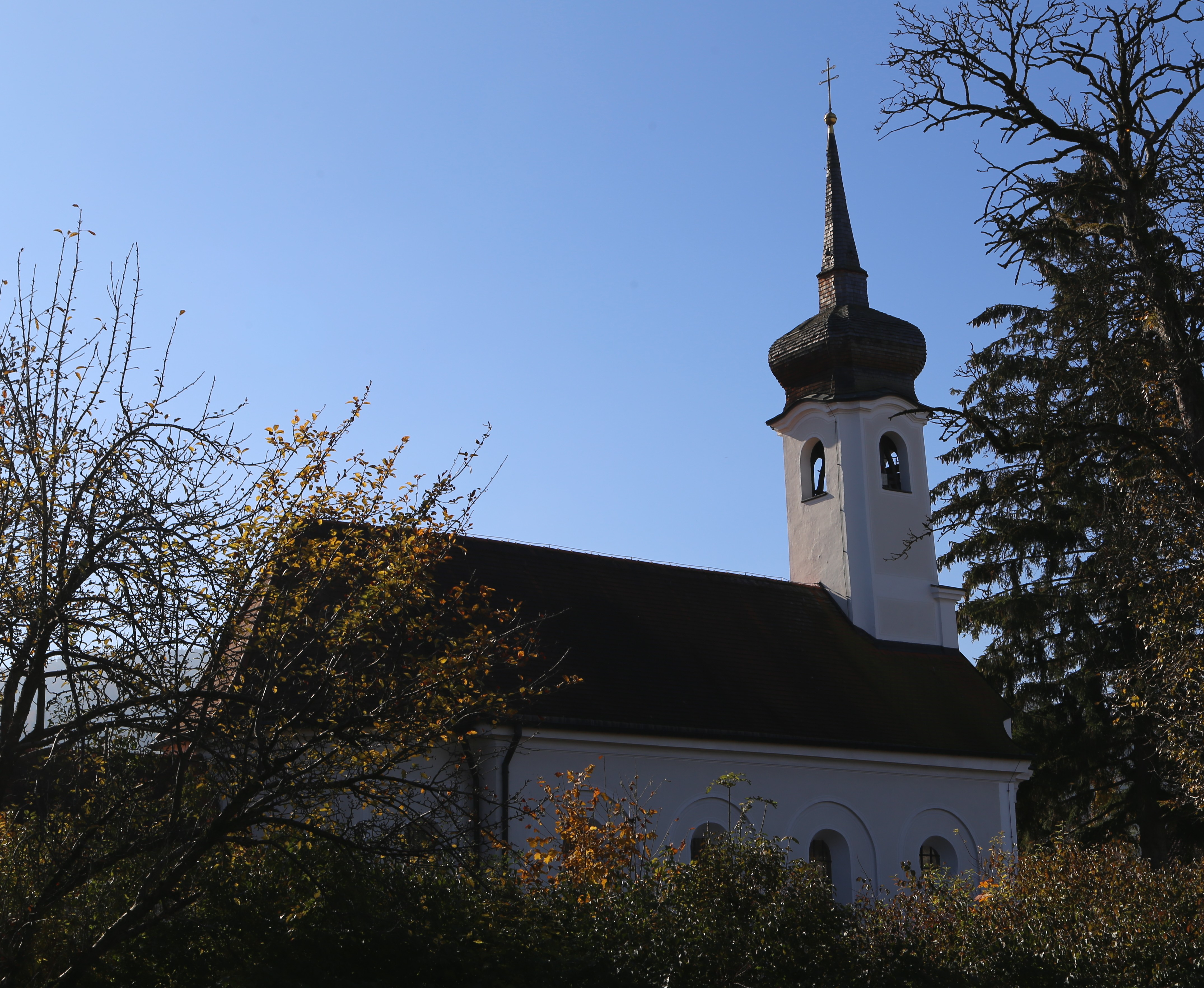 Taxakapelle, Massivbau mit Satteldach, Dachreiterturm mit Kuppelhaube und Blendbogengliederung, 1649-50, 1748 wohl durch Philipp Millauer barocker Ausbau; mit Ausstattung.; Au bei Bad Aibling, Bad Feilnbach